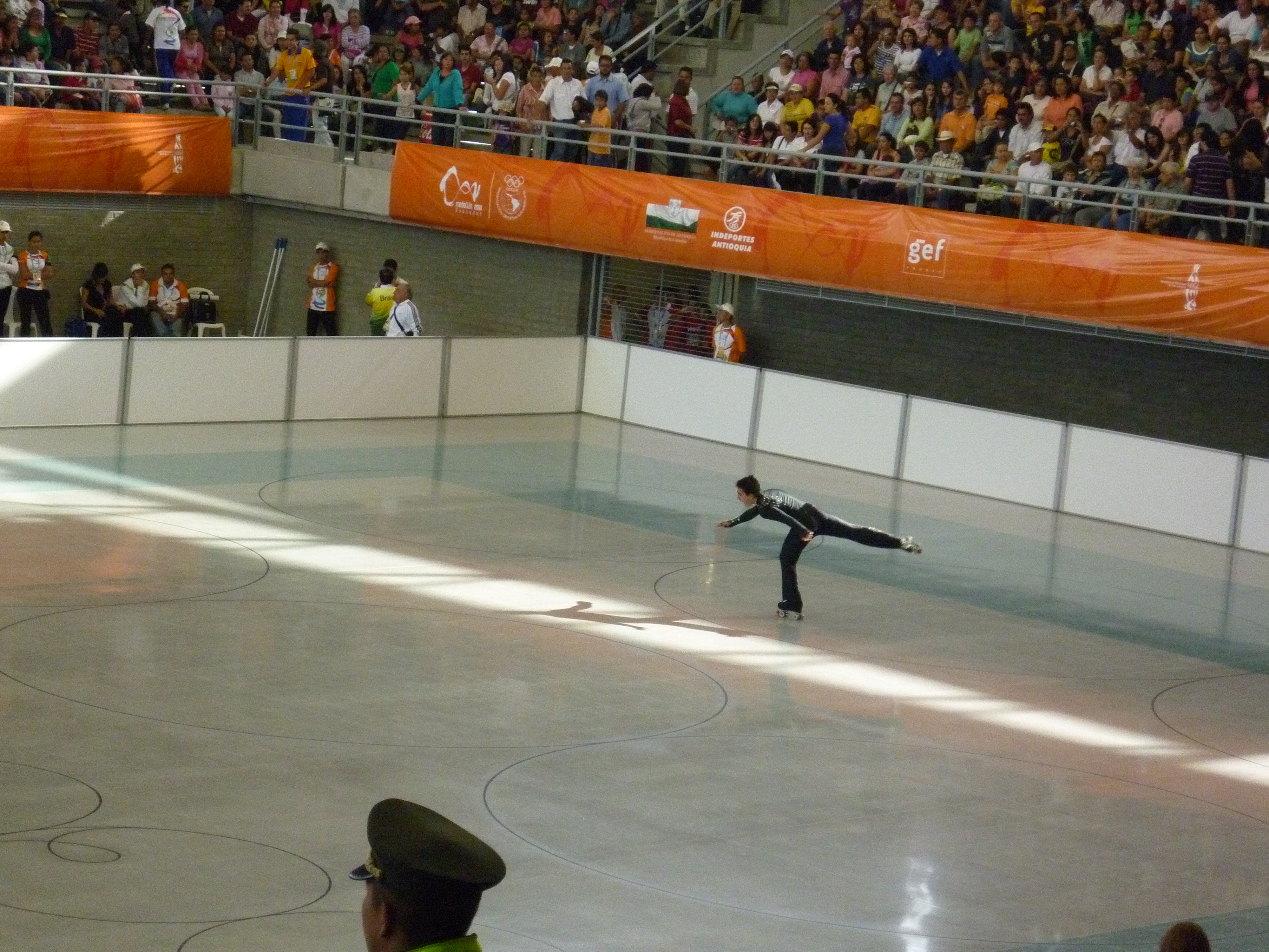 IX juegos suramericanos Medellin 2010, Subsede Rionegro; Patinaje Artistico.